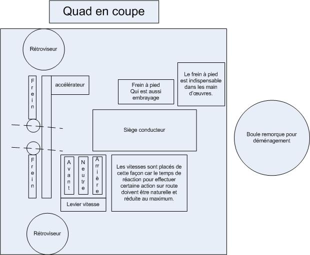 organisation d'un poste de commande